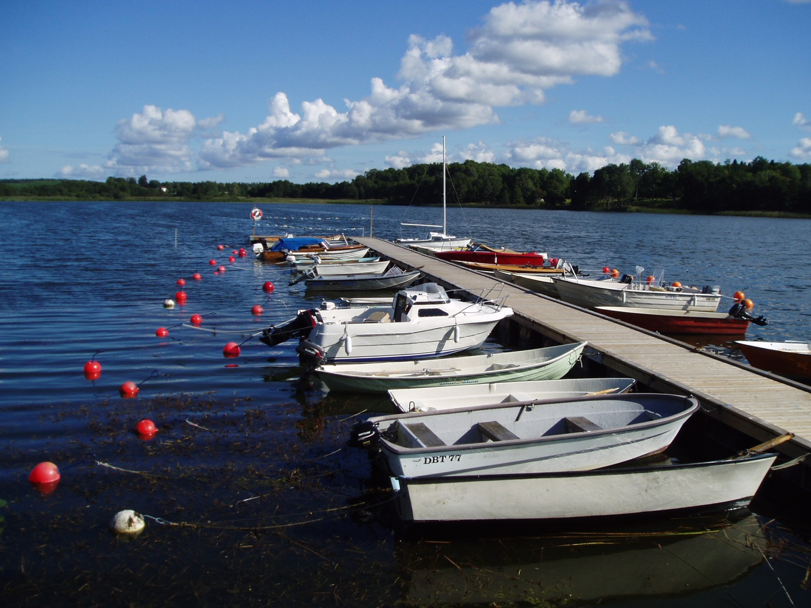 Långsjön, Rimbo, småbåtshamn